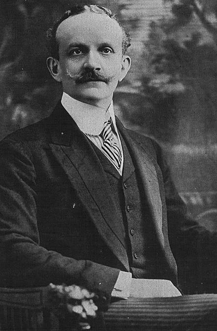 Bernstorff, Count Johann Heinrich von. 1862-1939.